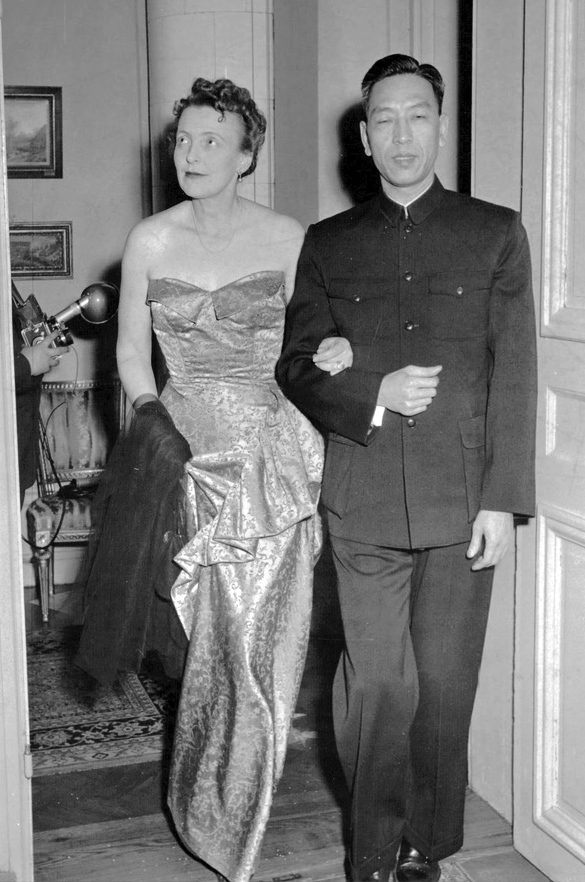 Utrikesminister Östen Undén gav på fredagen middag för diplomatiska kåren med damer i utrikesministerhotellet på Blasieholmen. Här ses kinesiska ambassadören Keng Piao med fru Greta Belfrage, maka till utrikesrådet Leif Belfrage, på väg till bordet.